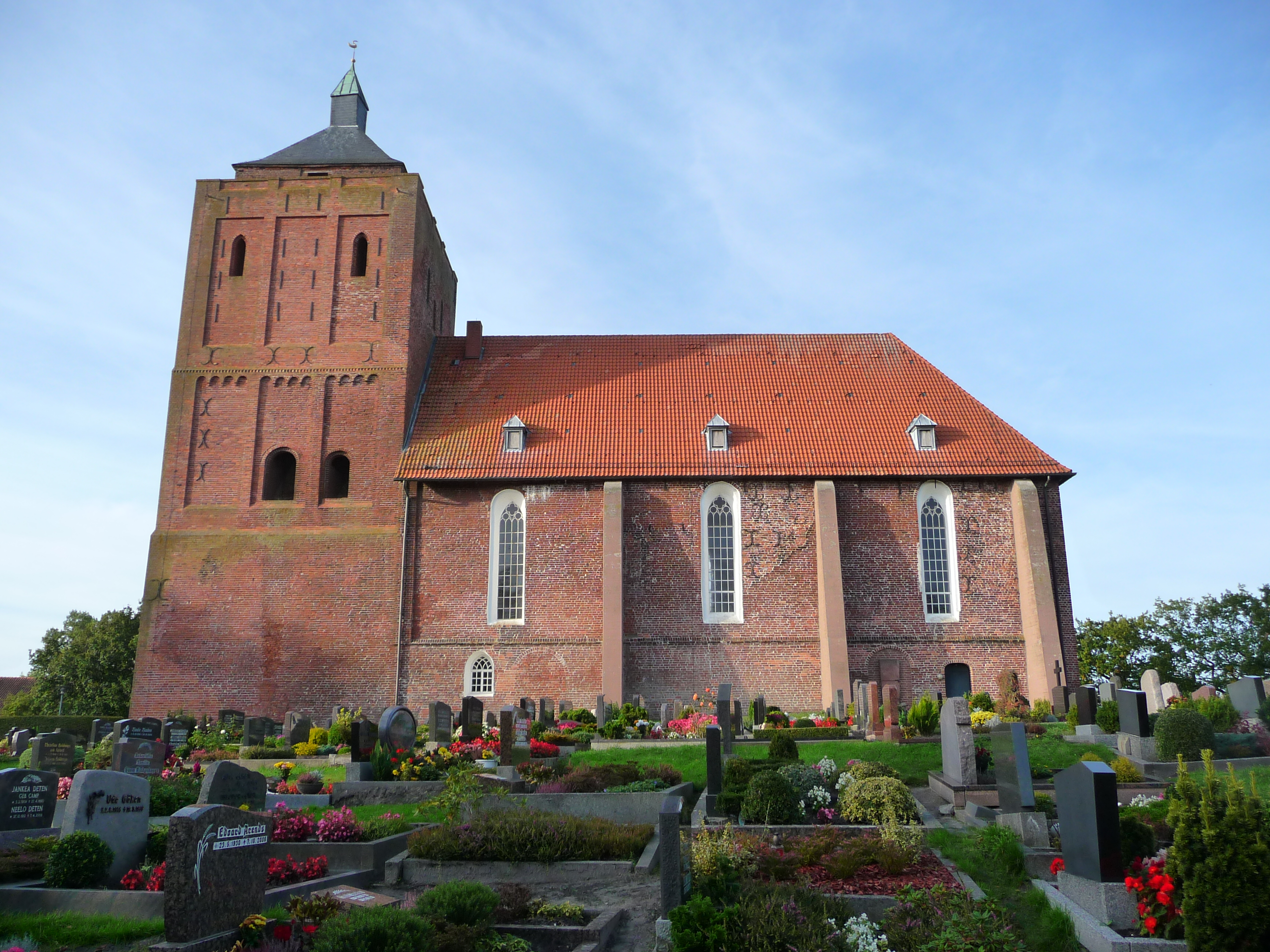 Seitenansicht der evangelisch-lutherischen Kirche Warnfried in der Gemeinde Osteel (Samtgemeinde Brookmerland, Landkreis Aurich, Ostfriesland, Niedersachsen, Deutschland)